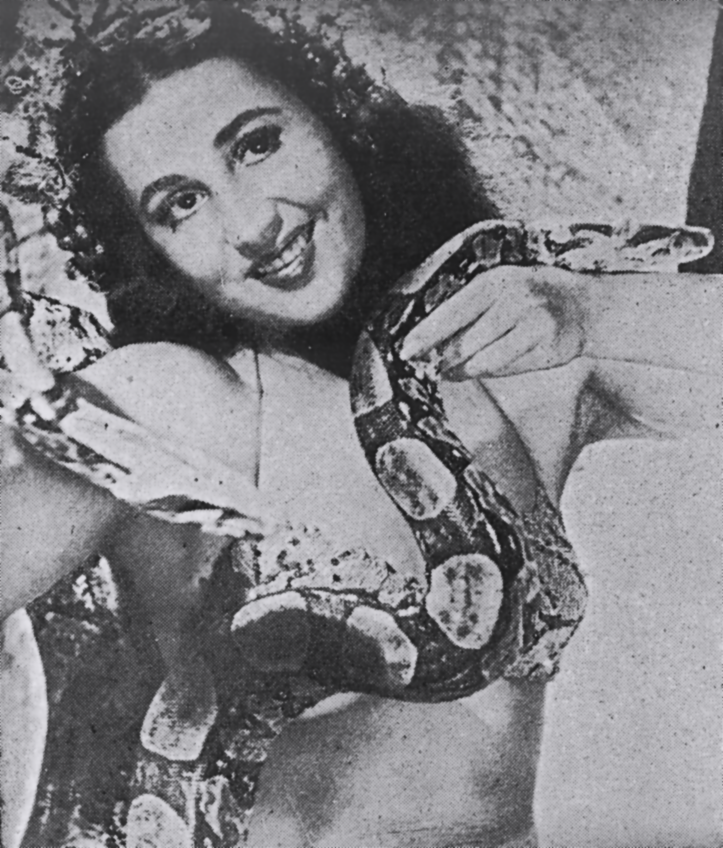 A vedete brasileira Luz del Fuego em 1946, em fotografia registrada no filme No Trampolim da Vida.